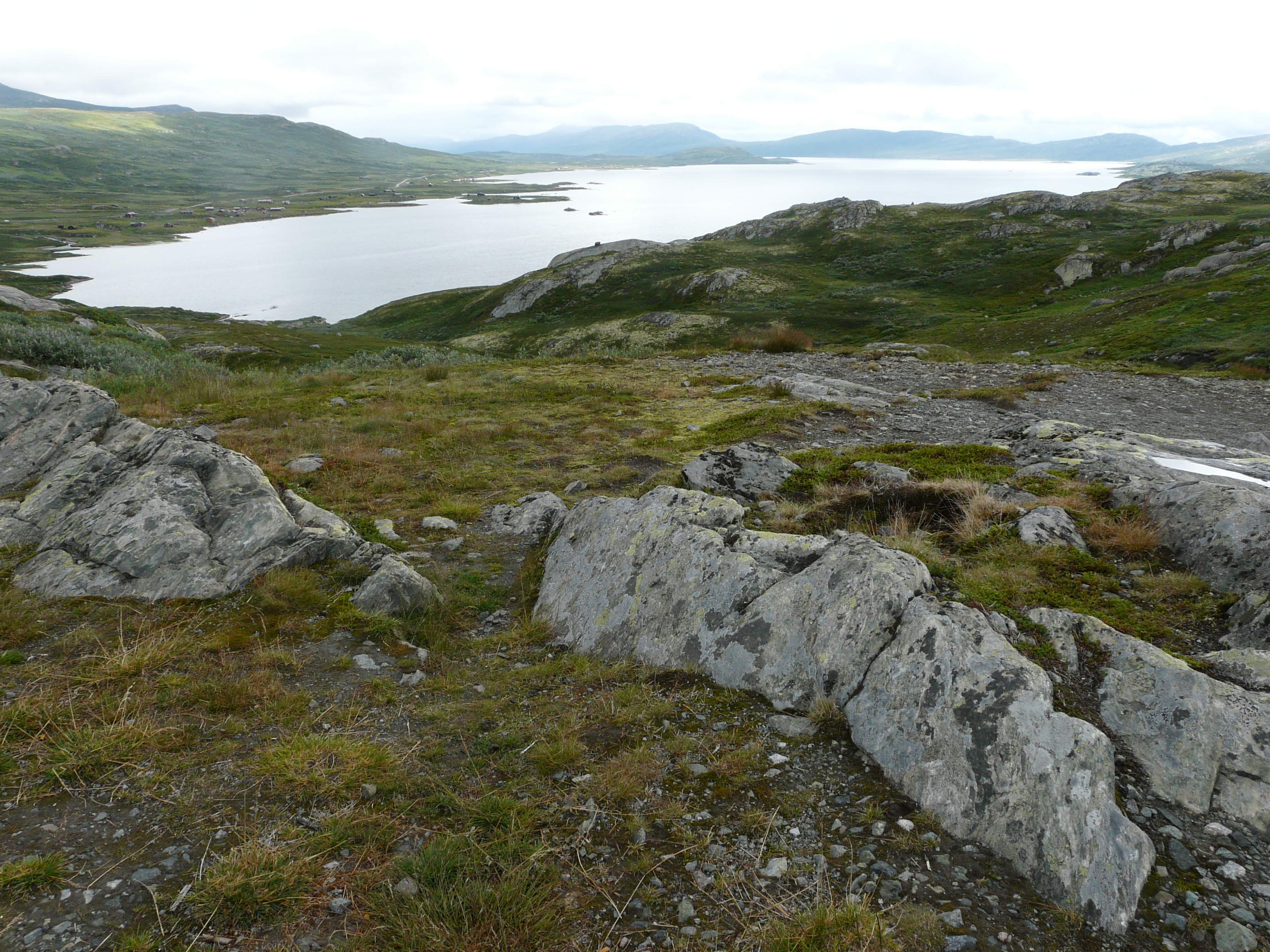 meer Vinstri